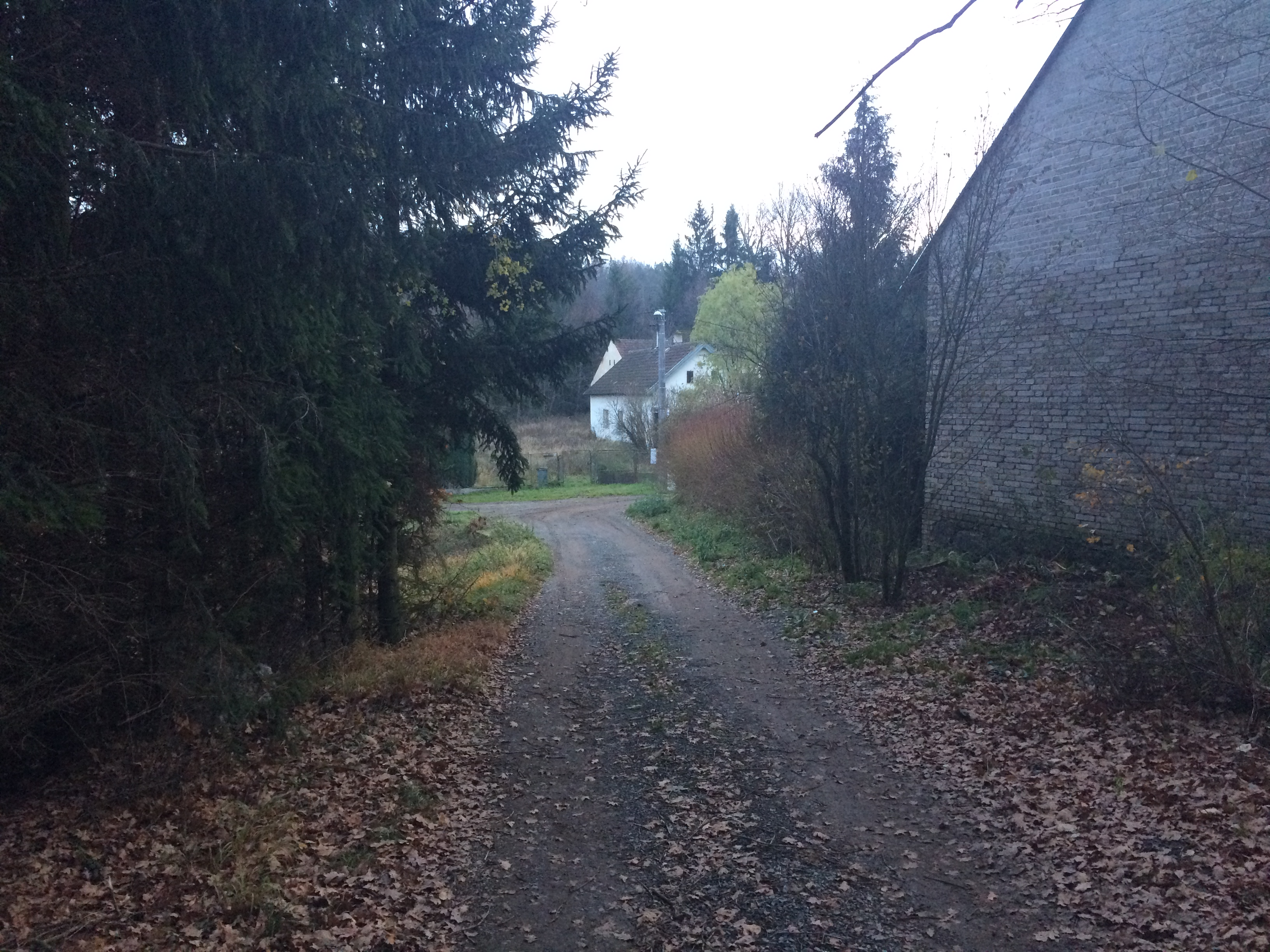 Vjezd do osady Nová Huť po cestě od Blovic přes zahrádkářskou kolonii